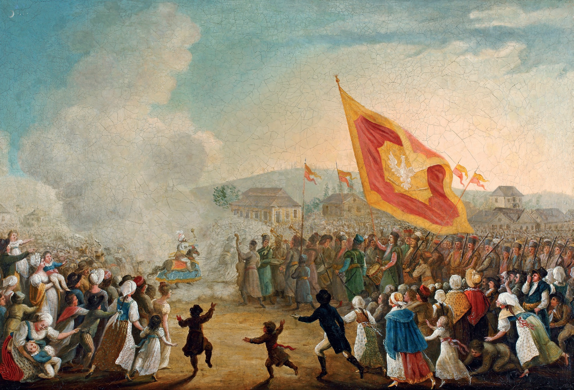 Obraz Michała Stachowicza "Obchód Lajkonika" z roku 1818, zbiory Muzeum Historycznego Miasta Krakowa